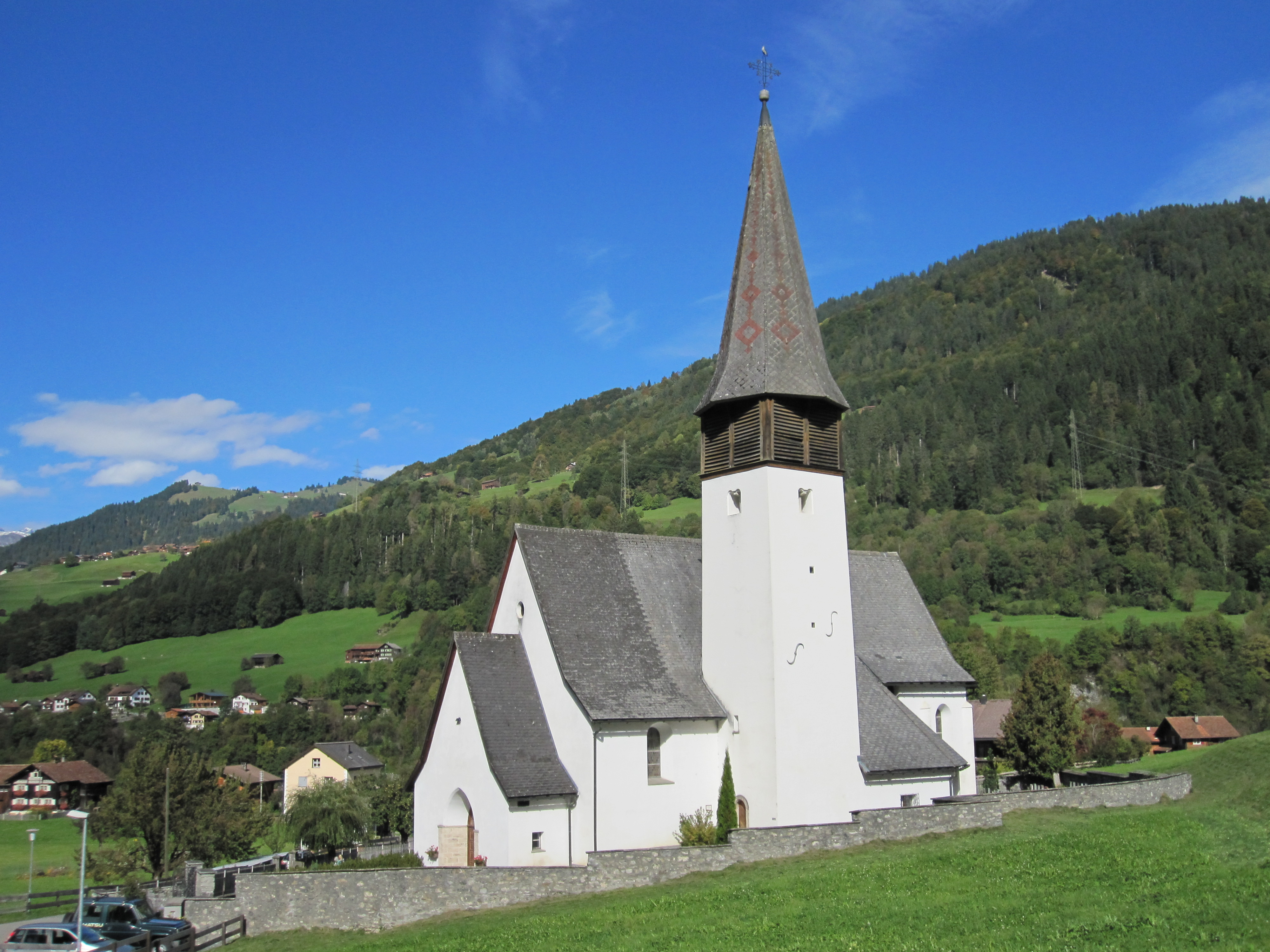 reformierte Kirche Jenaz (Kanton Graubünden)